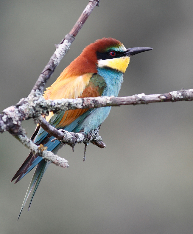 Abejaruco